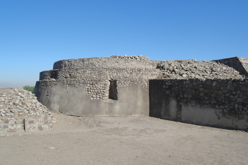 Huexotla, structure 4 side buildings